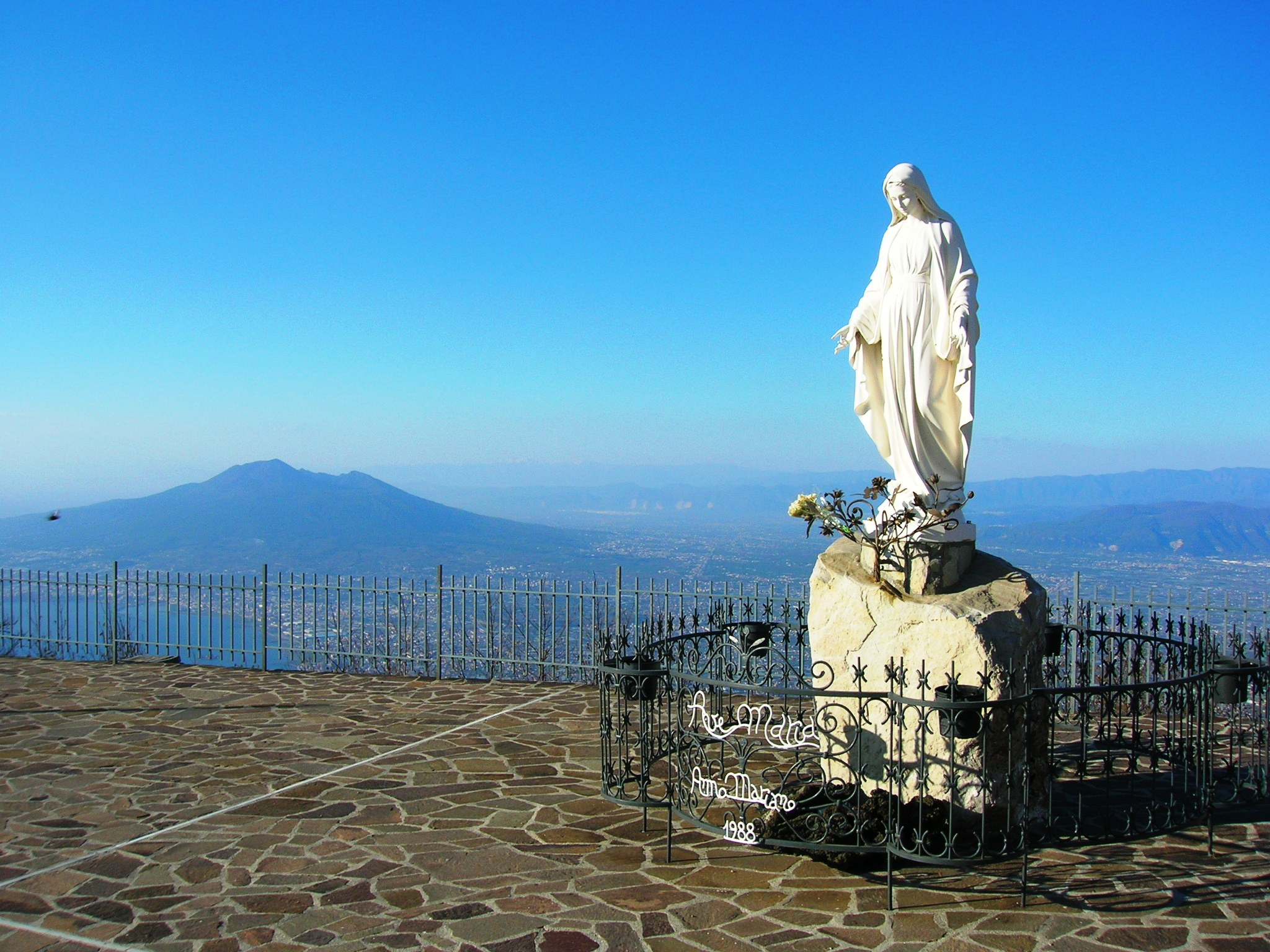 Statua della Madonna con alle spalle il Vesuvio al Santuario di San Michele sul Monte Faito